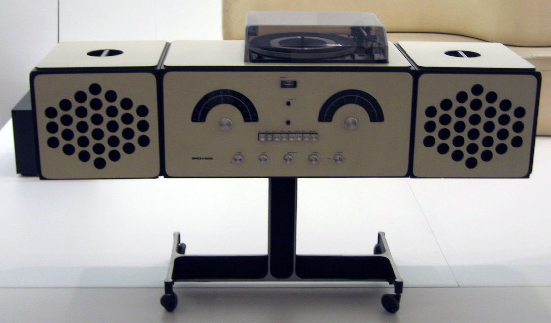 Stereokombination RR 126, 1966, Pinakothek der Moderne, München Hersteller: Brionvega S.p.A., Mailand, Italien Achille Castiglioni 1918-2002 Pier Giacomo Castiglioni 1913-1968